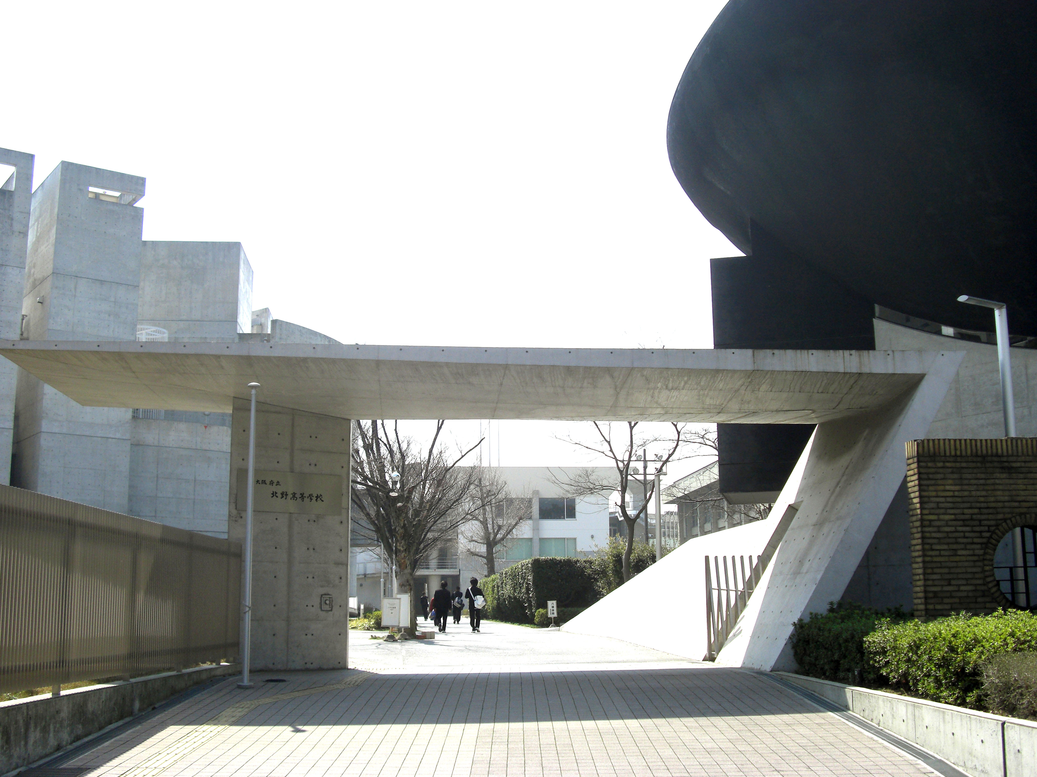 Kitano High School,Shin-kitano Yodogawa-ku Osaka-City Osaka Japan.